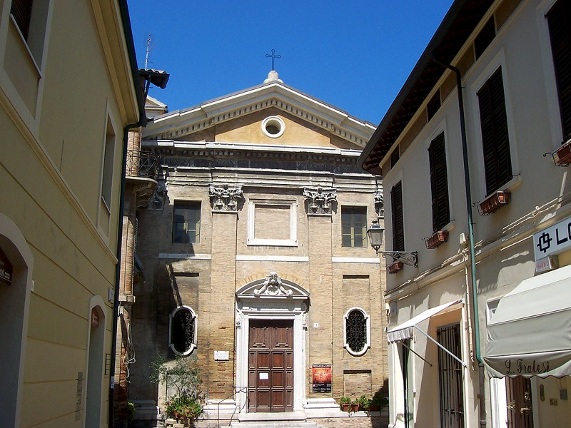 Senigallia - Chiesa di S. Croce